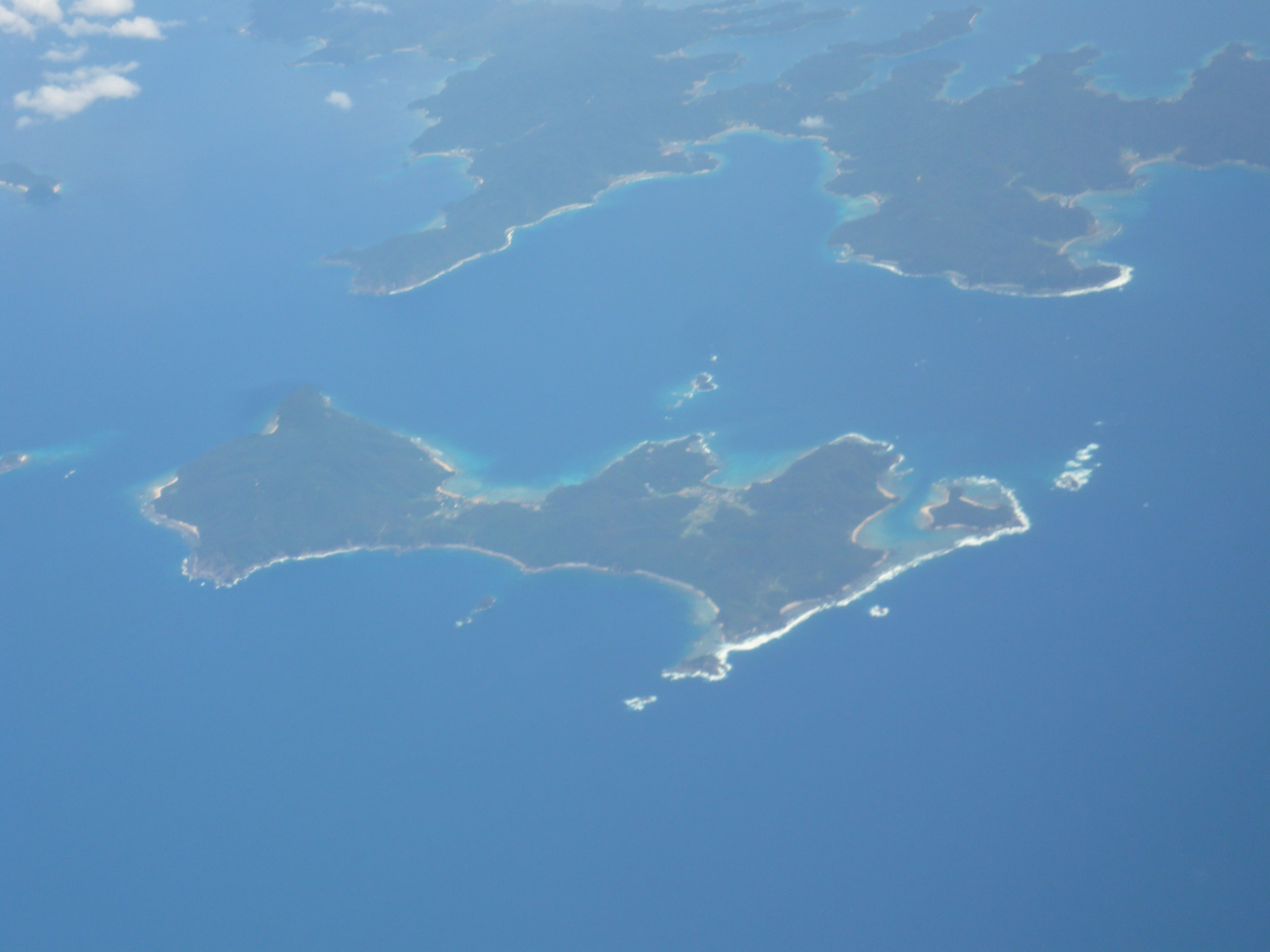 奄美諸島南部の請島。機内より撮影